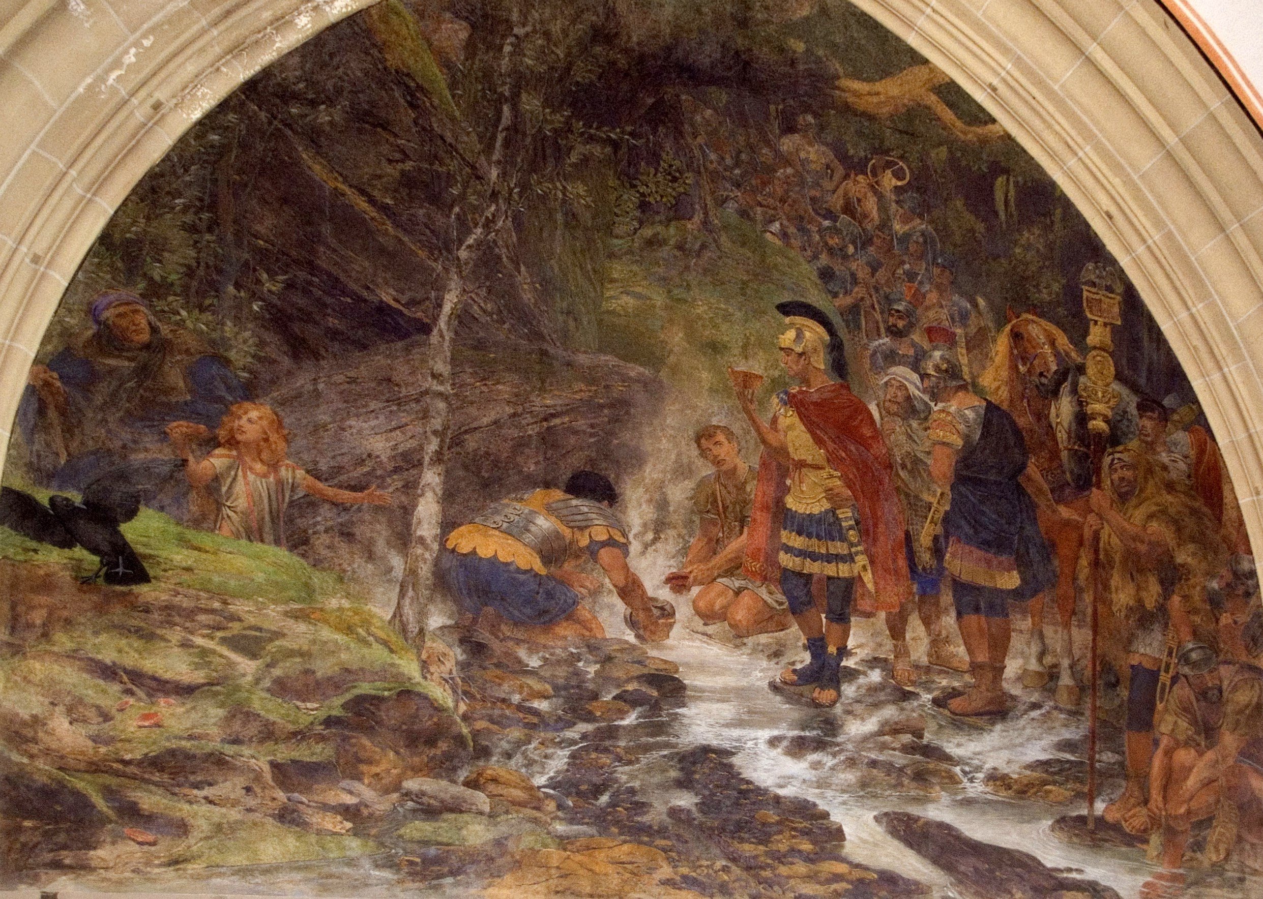 Северный Рейн - Вестфалия, Ахен - Ратуша